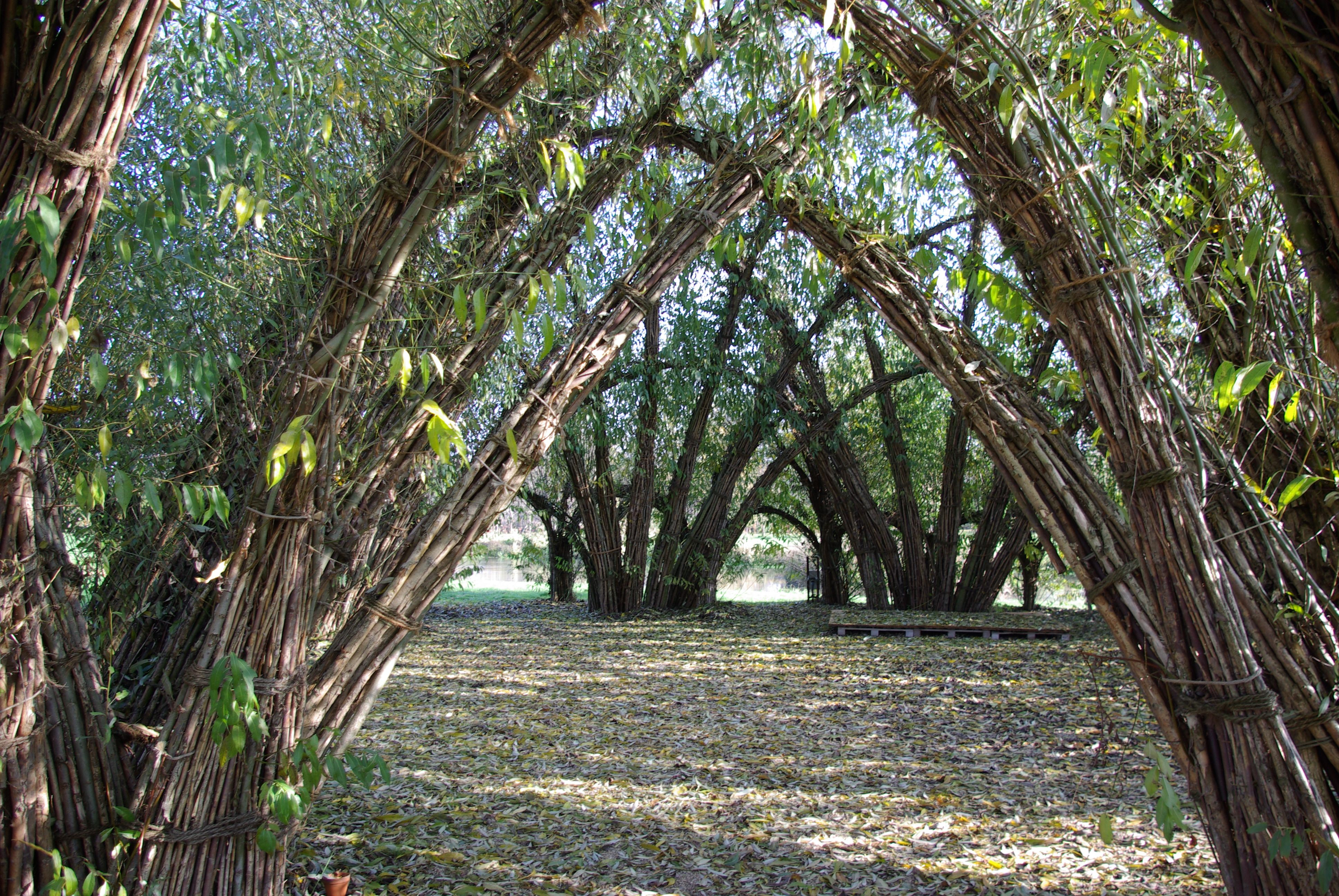 Schlepzig in Brandenburg. Der Weidendom ist ein aus lebenden Weiden errichtetes Gebäude. Das 2004 entstandene Bauwerk hat eine Breite von 22 Meter und eine Höhe von 11 Metern.